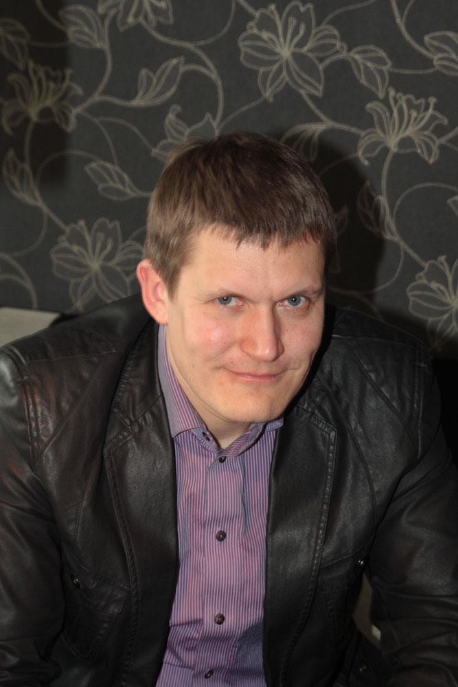 Argo Kirss